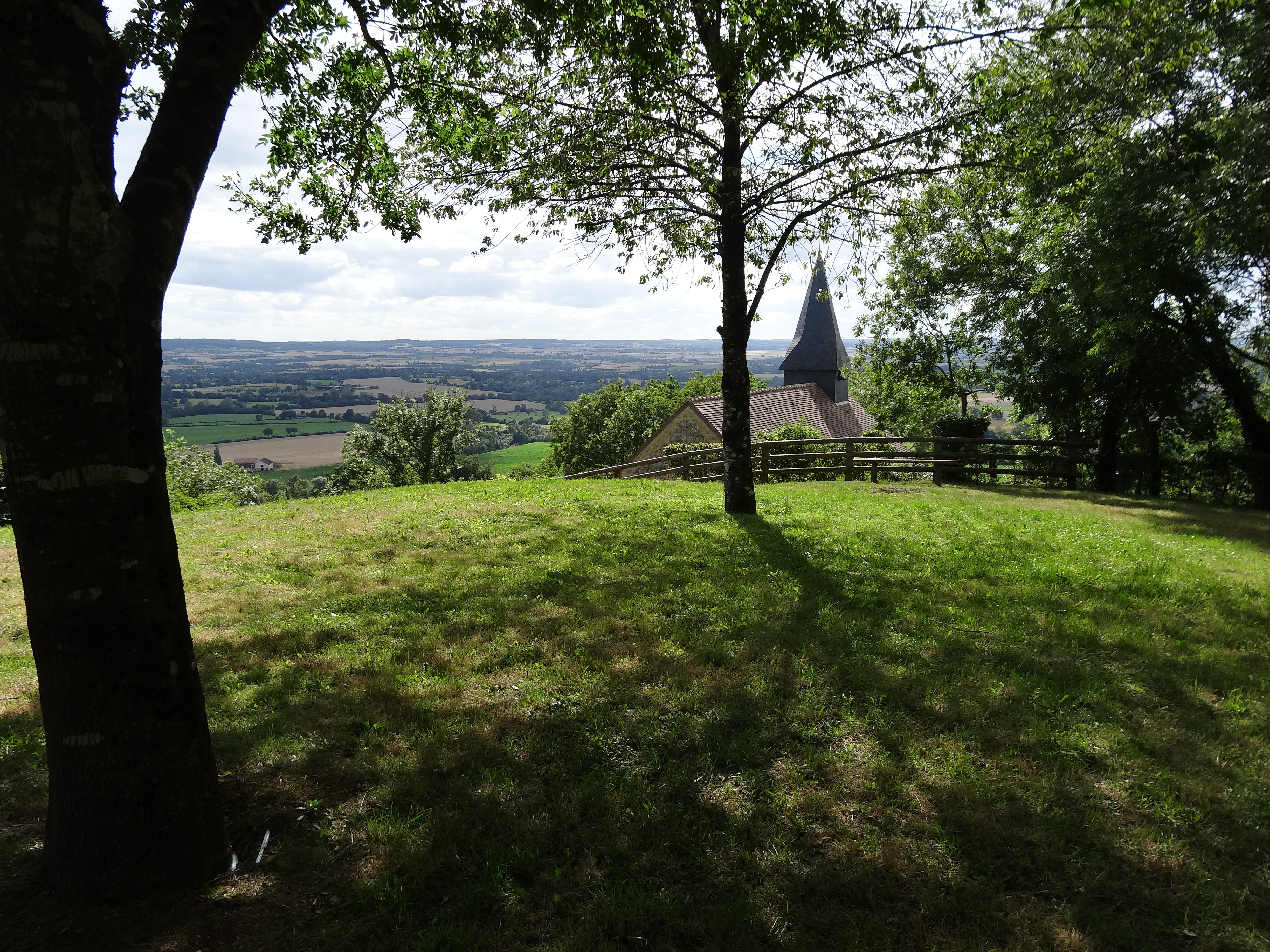 Coudehard, (Orne), église